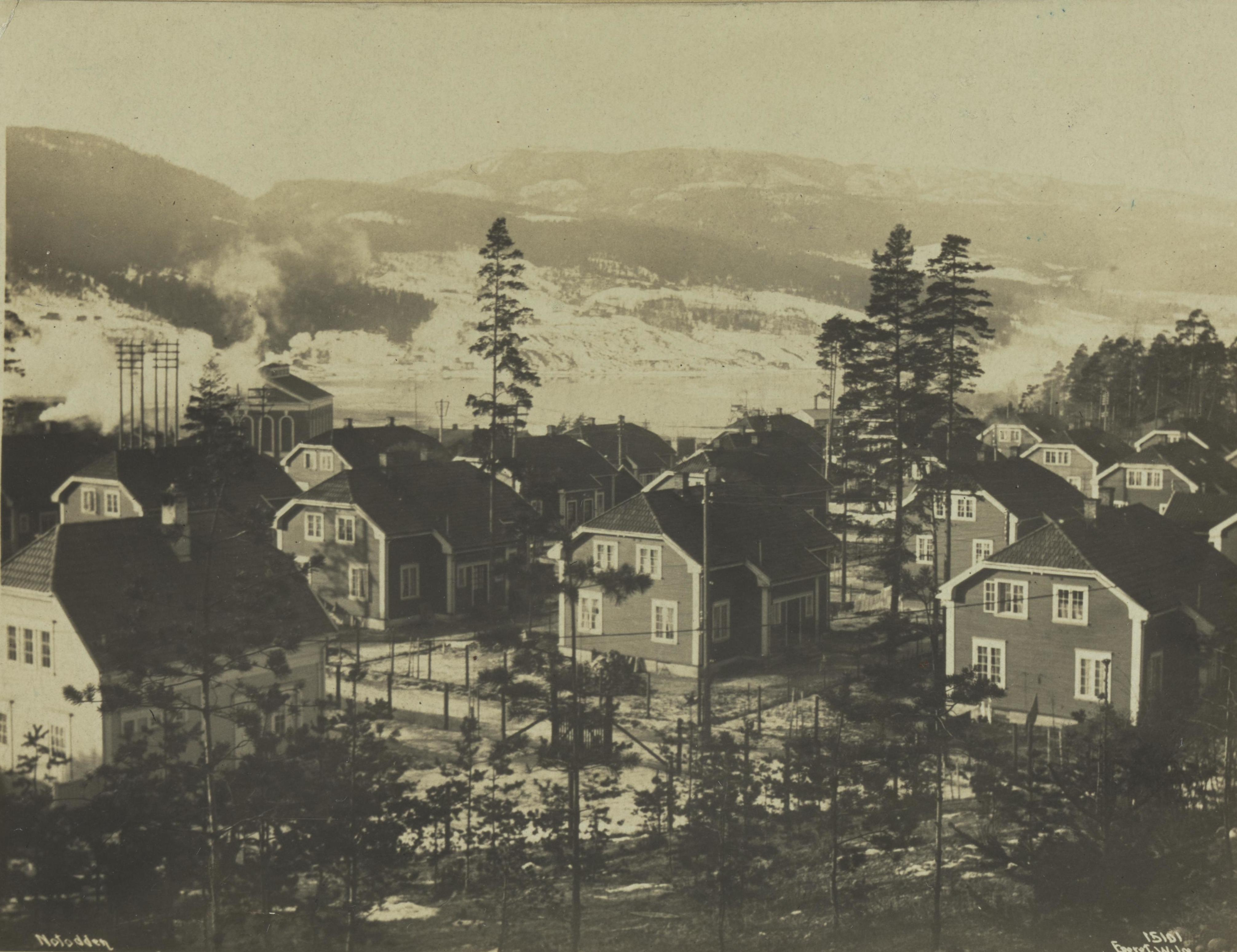 Bildet er hentet fra Nasjonalbibliotekets bildesamling Grønnbyen, Notodden, Telemark Bildet er tatt fra veien opp mot Admini, mot vest. Tinfos Jernverk i bakgrunnen.fra Galleri NOR